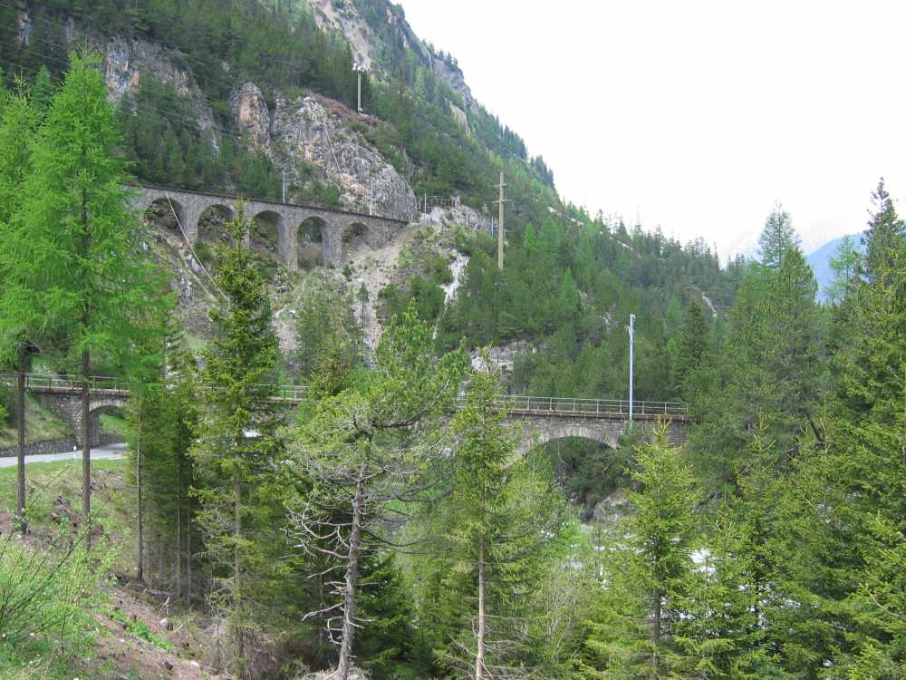 Weitere Brückenbauwerke der Albulabahn